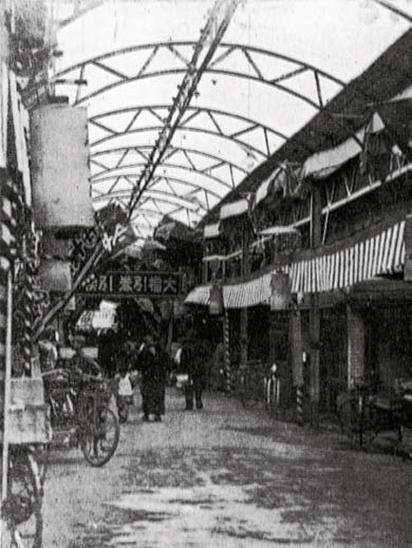 堀川京極、1930年代-1940年代